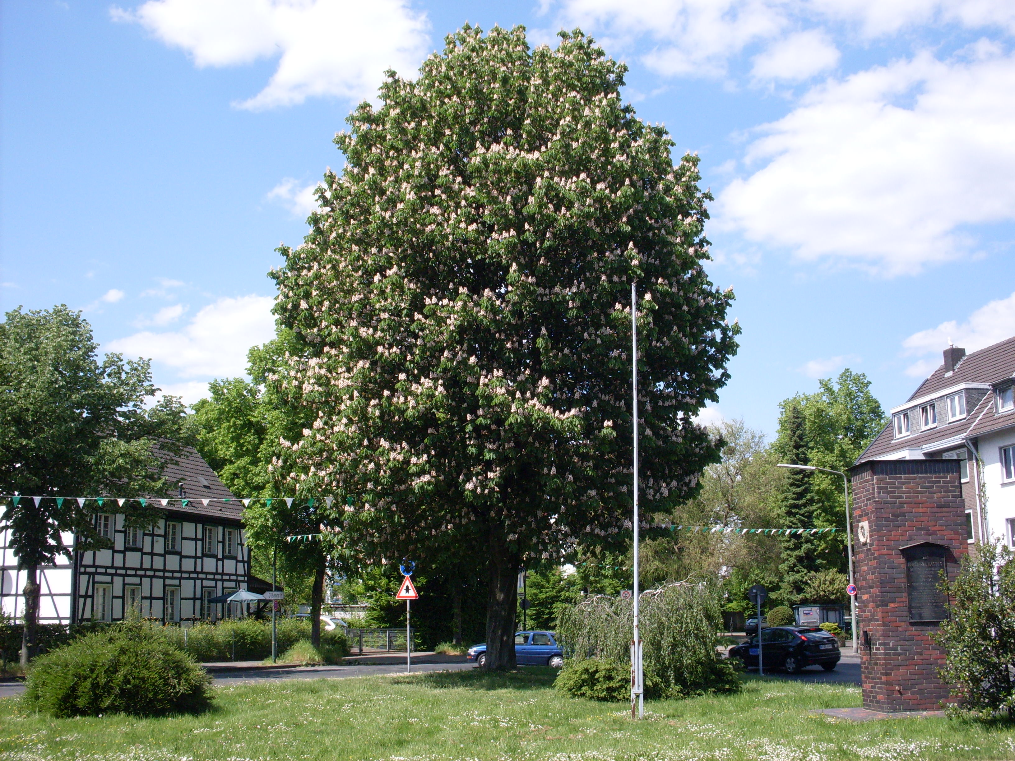 Düsseldorf-Hassels Platz mit Kriegerdenkmal